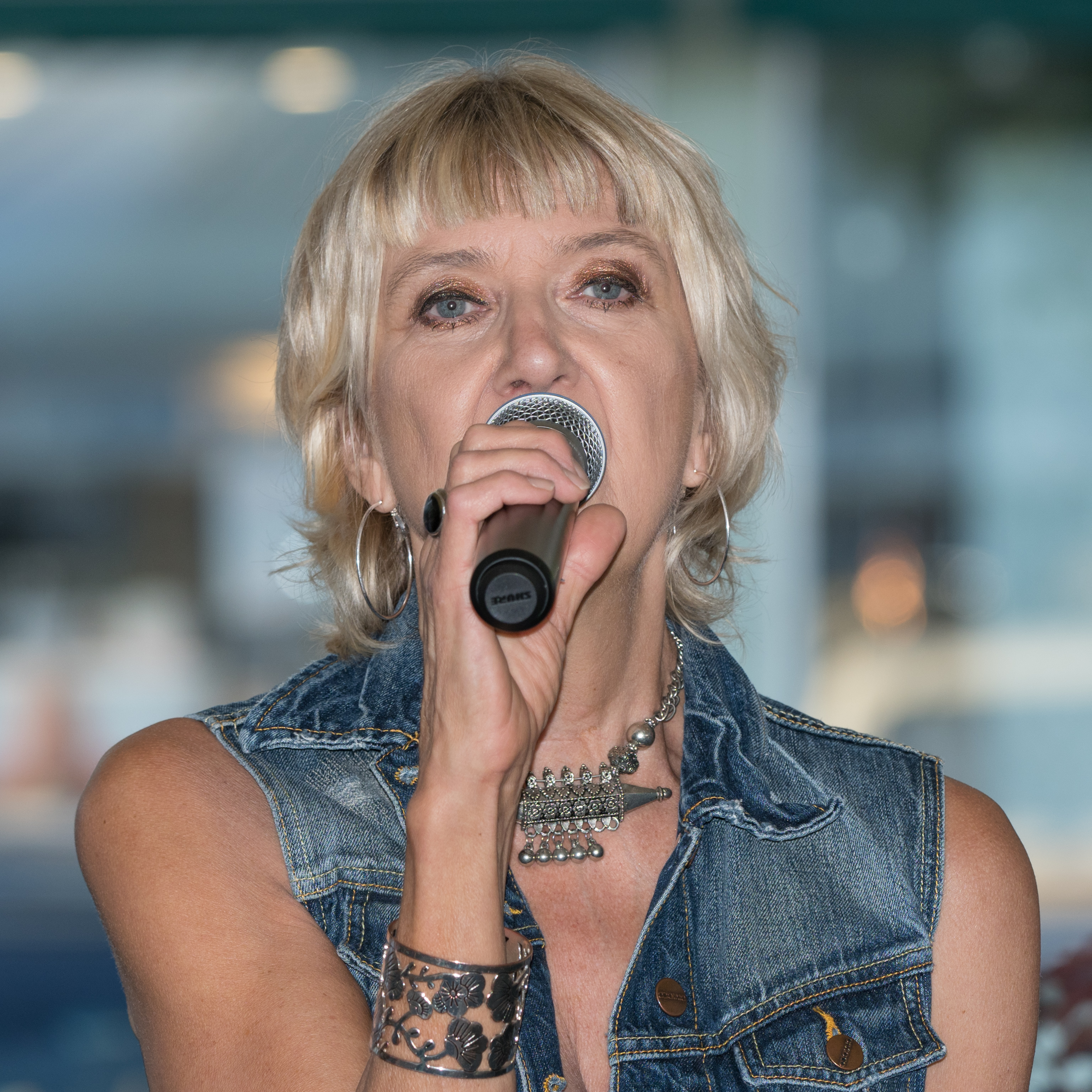 Suzzie Tapper & Karin Wistrand at Winbergs, Vaxholm, Stockholm, Sweden, July 2018